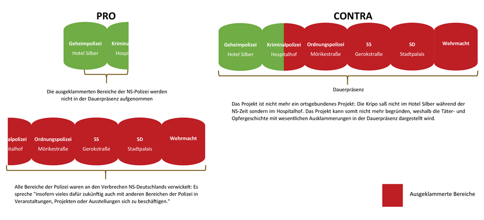 Unveränderte Projektgrundlage Hotel Silber PRO und CONTRA